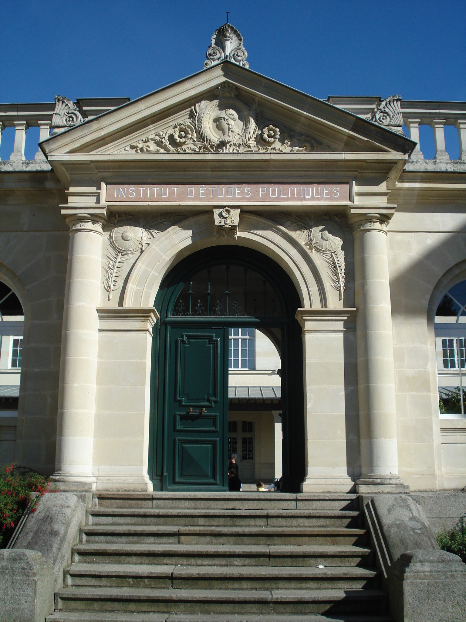 Façade l’Institut d'études politiques de Rennes, anciennement école normale d'institutrices, construit en 1882 par l'architecte départemental Jean-Marie Laloy.